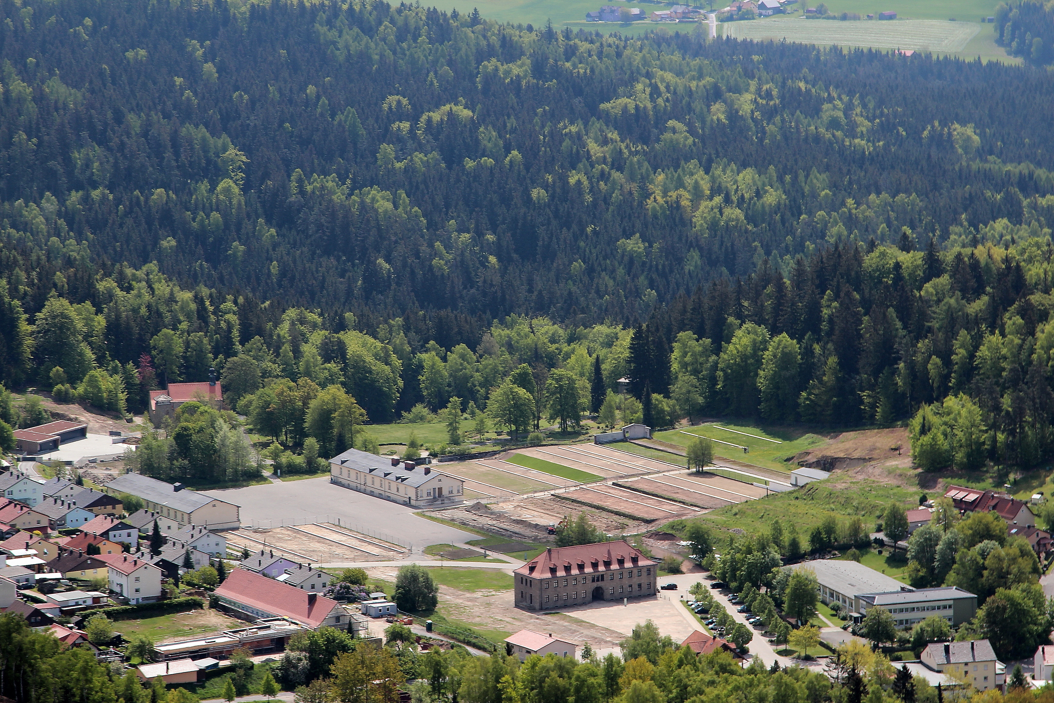 Gelände des ehemaligen Konzentrationslagers Flossenbürg, Landkreis Neustadt an der Waldnaab, Oberpfalz, Bayern (2014)